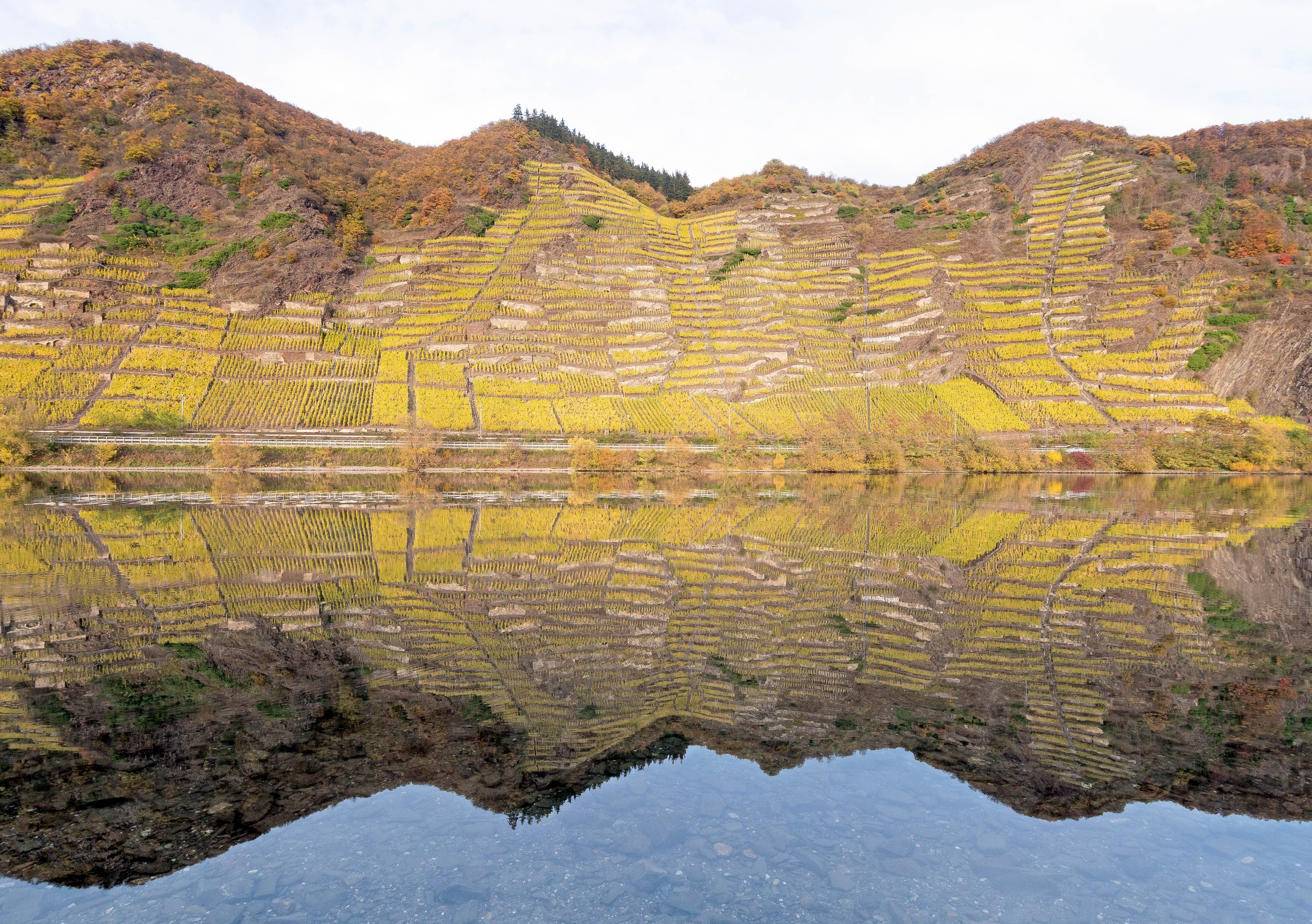 Der Uhlen zwischen Kobern und Winningen